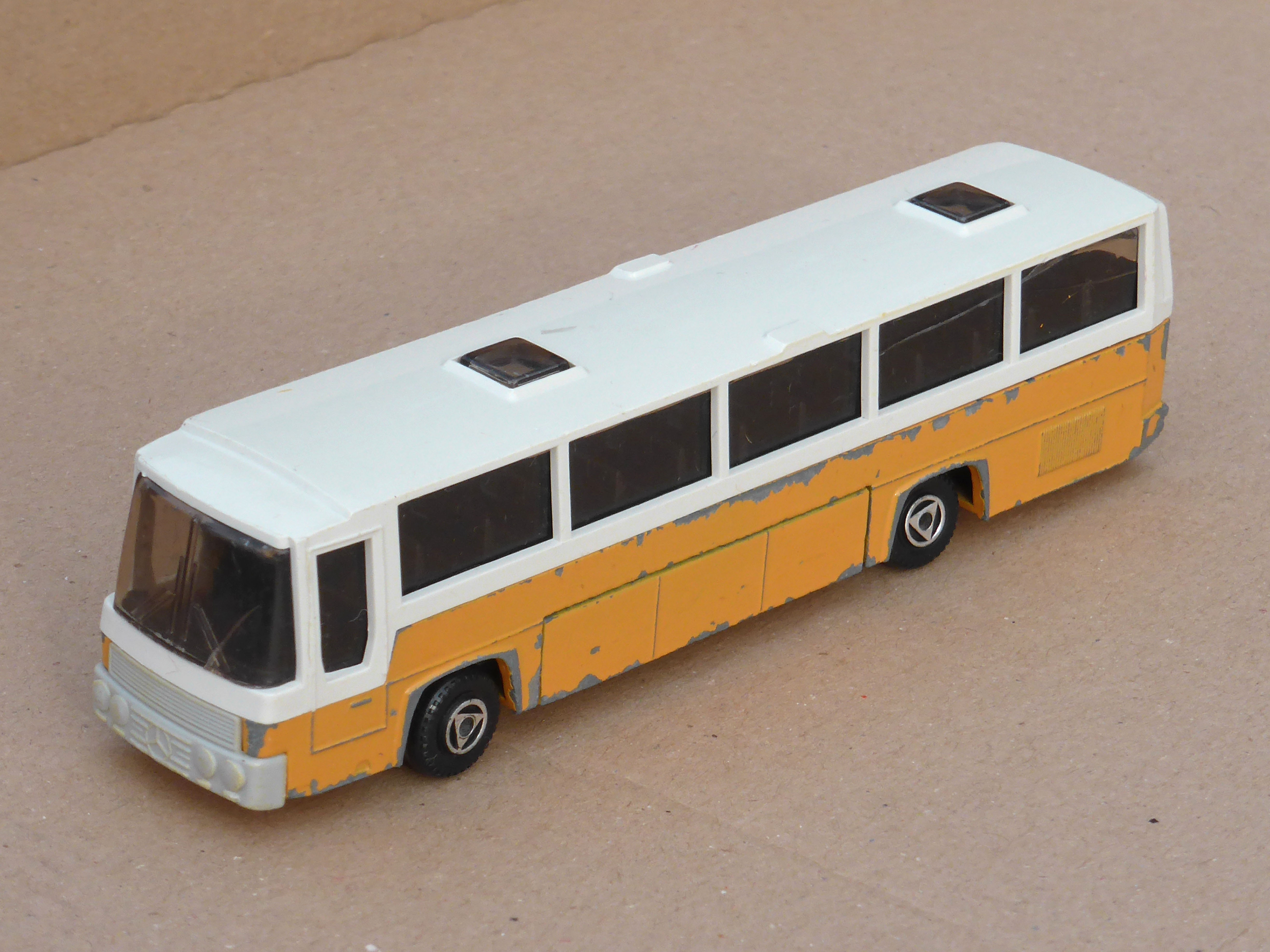 Mercedes-Busmodell von Efsi (Holland) im Maßstab 1:87.